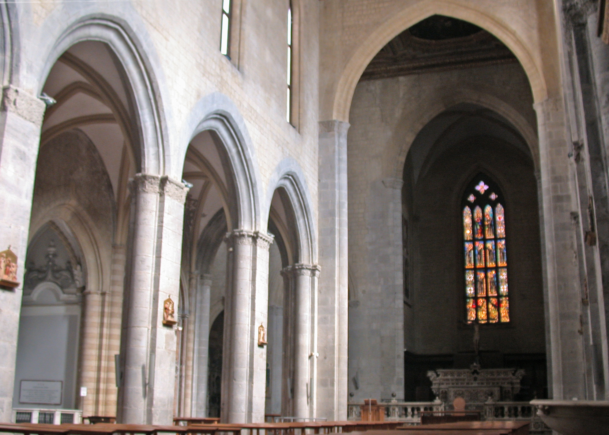 Italia, regione Campania, Napoli, chiesa di San Pietro a Maiella, intorno scorcio della navata centrale.